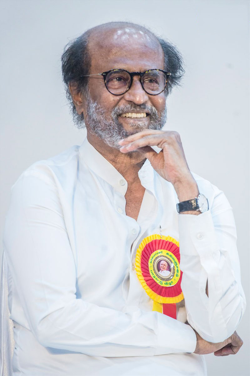 Rajinikanth Felicitates Writer Kalaignanam